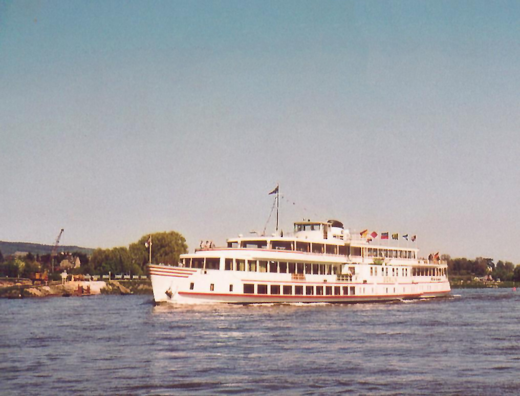 Beschreibung: Tagesausflugsschiff MS Berlin Quelle: eigenes Bild Datum: Sommer 1982 Autor: F.Lang